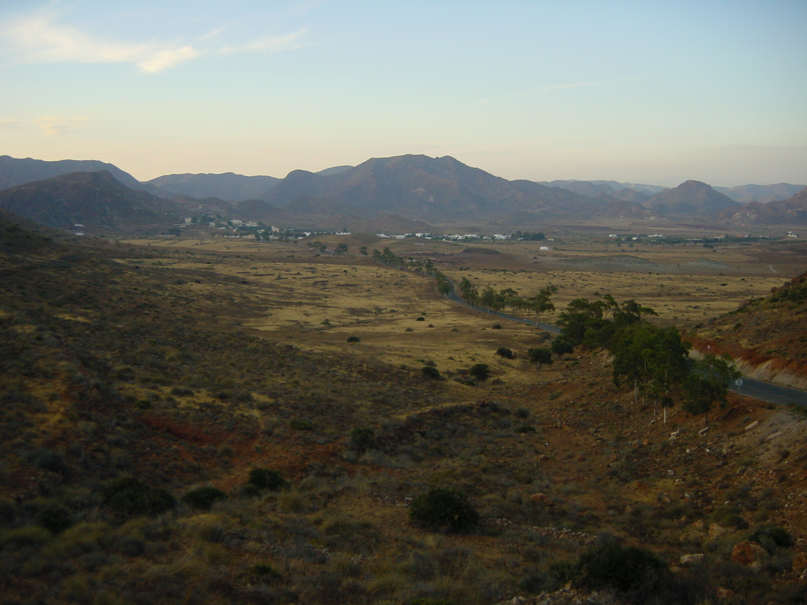 Parque natural del Cabo de Gata-Níjar This is a photography of a Site of Community Importance in Spain with the ID: ES0000046. Natura2000 entry, EEA entry